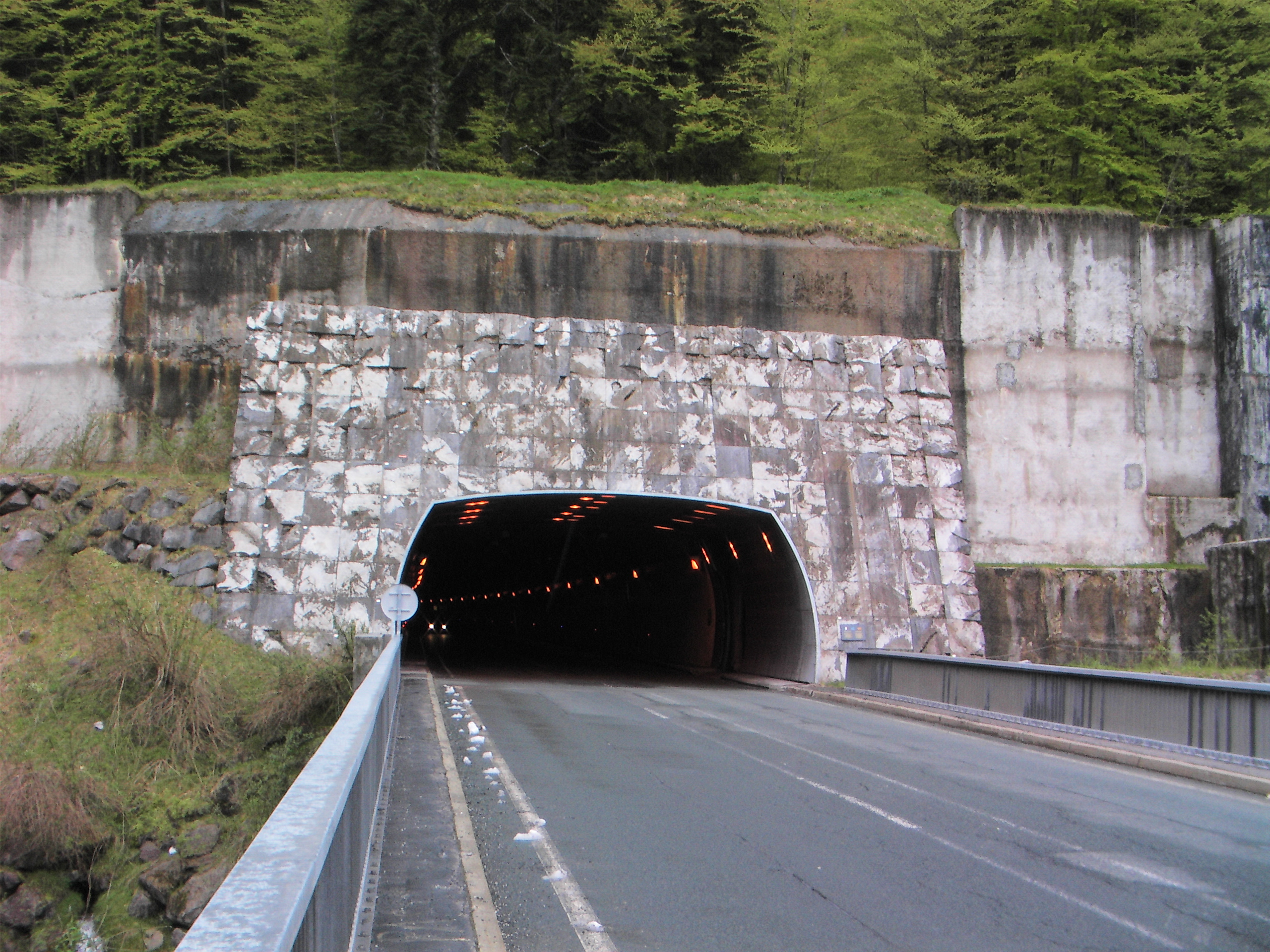 Tunnel du Somport le 16 mai 2010 depuis le côté français.